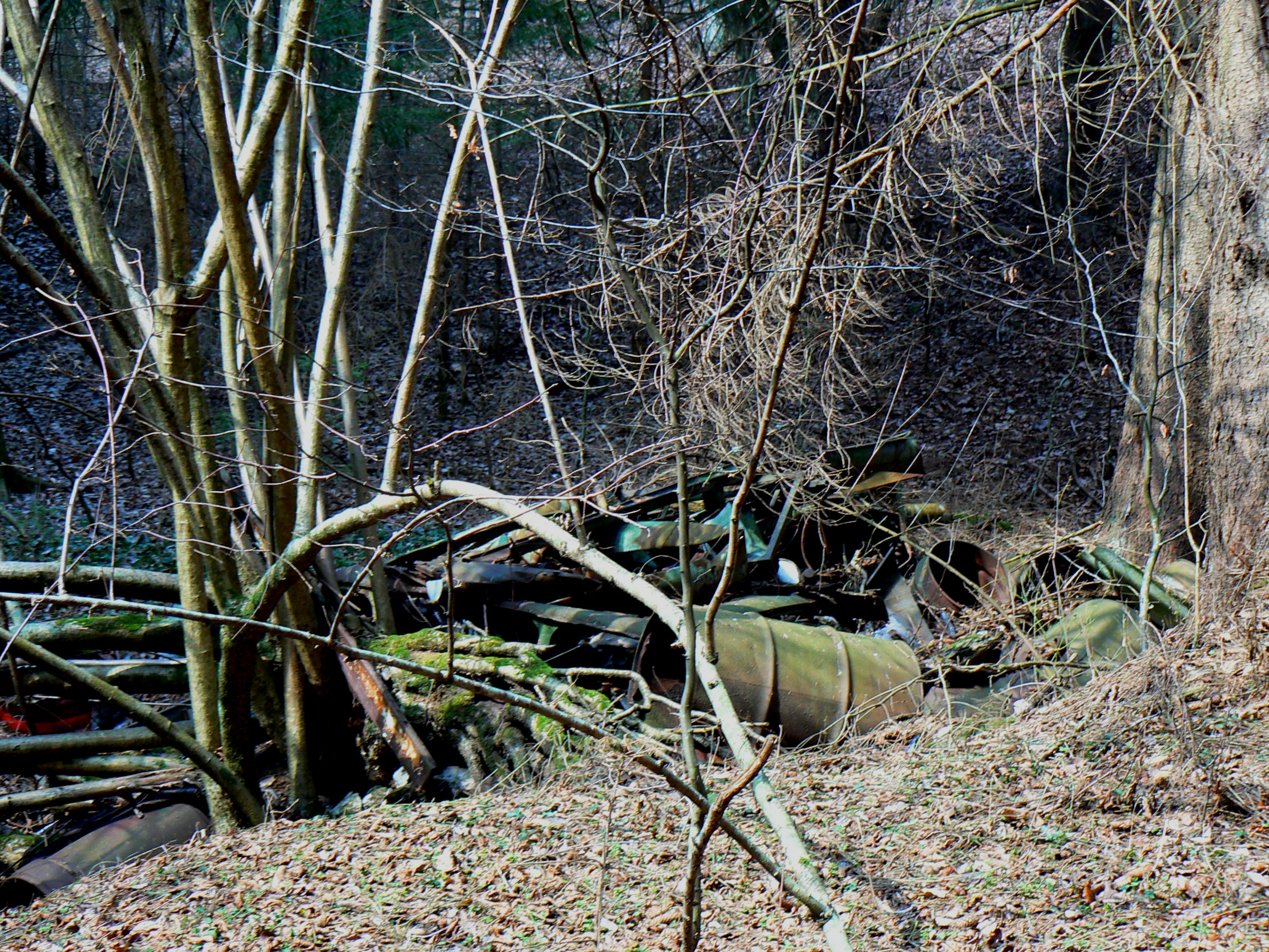 Odlagališče smeti pri izviru Črnušnice